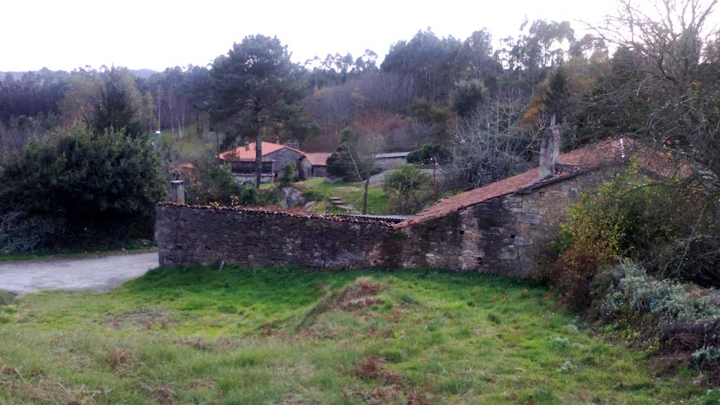 Vista do Espiño, Brión.